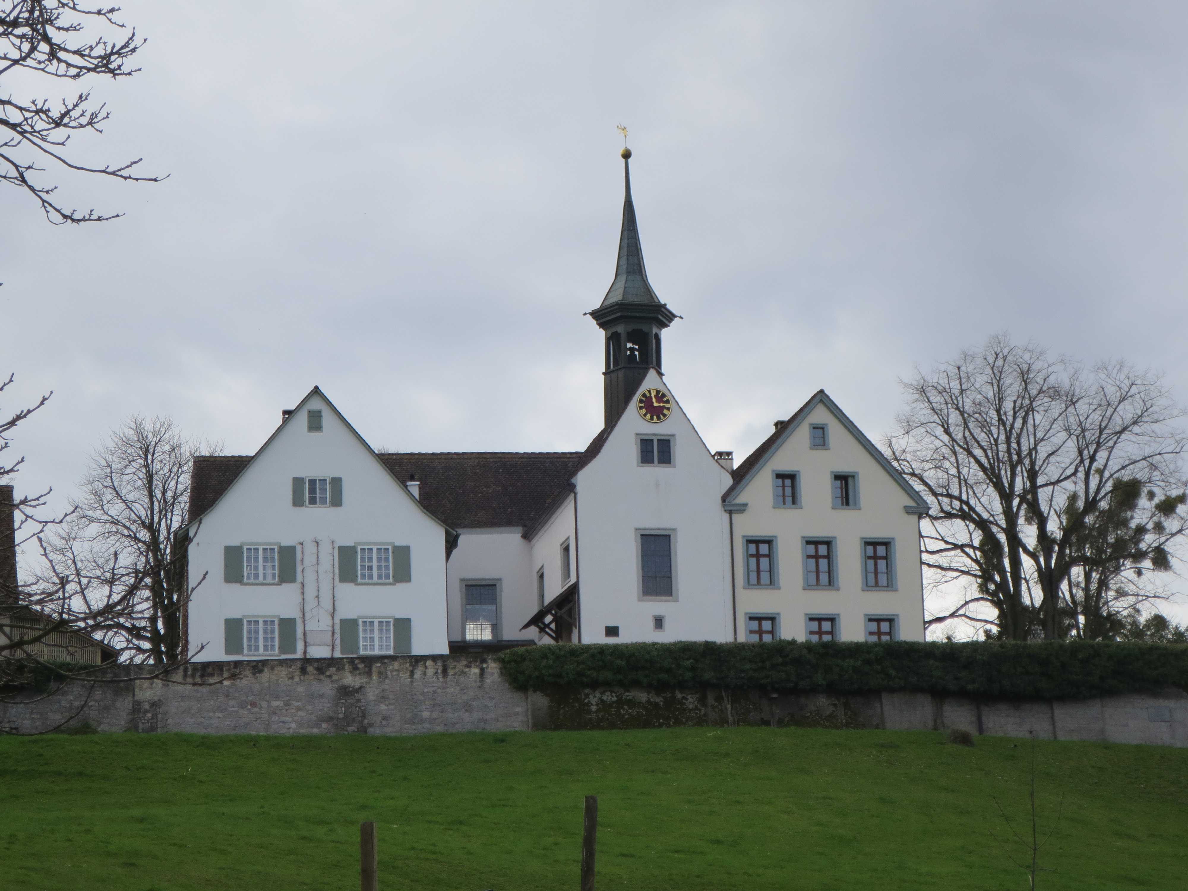 Margarethenkirche Binningen, Schweiz, aussen